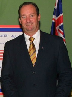 Mark Vaile on 18 May 2004.